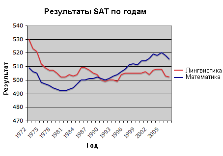 Динаміка результатів SATза двома основними розділами.